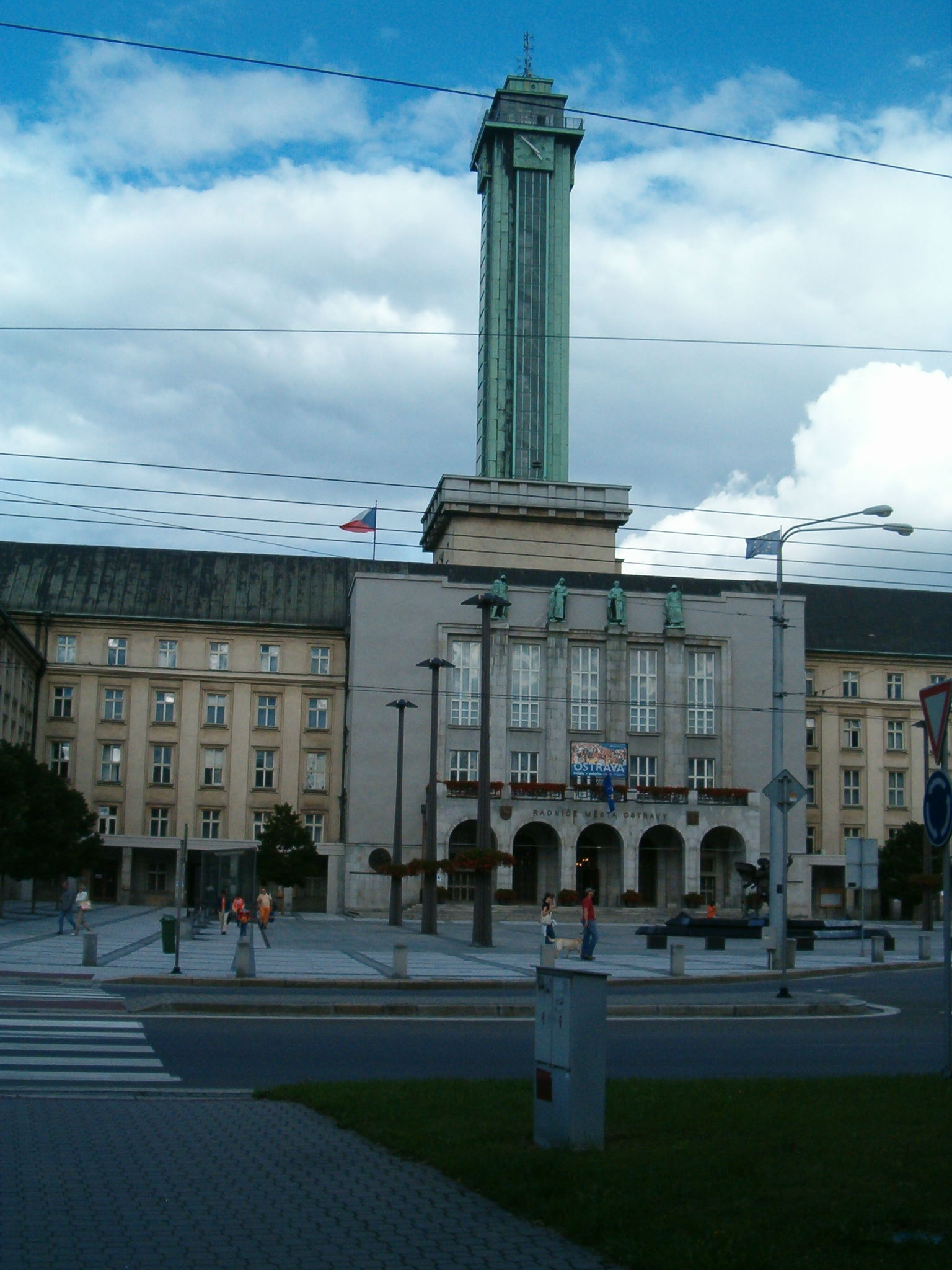 Nová radnice